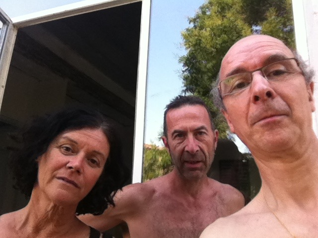 Ensemble Luxus (Labbé, Lefebvre, Cotinaud). Ph.Selfi